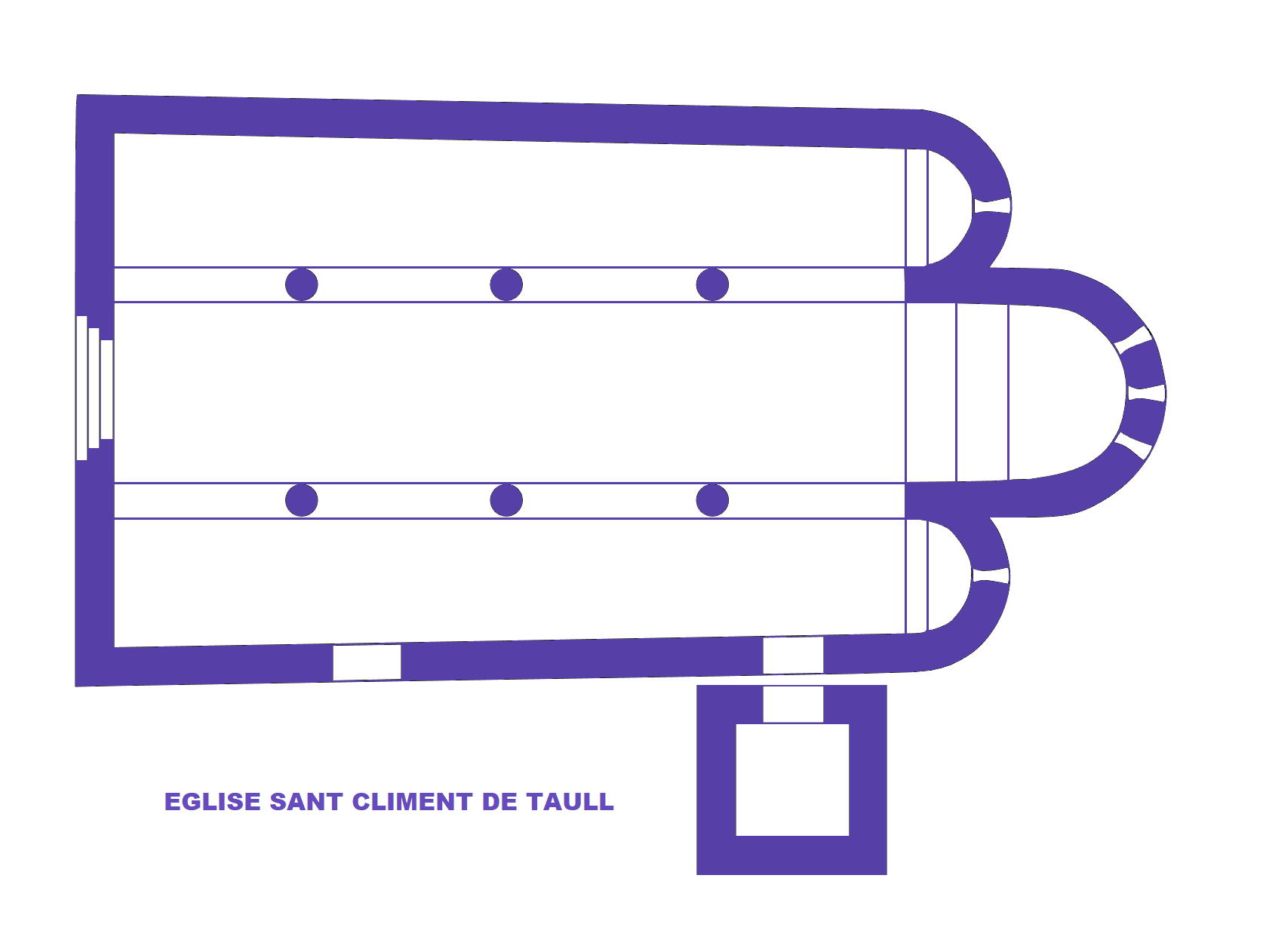 Eglise Sant Climent dr Taull (image Commons modifiée)